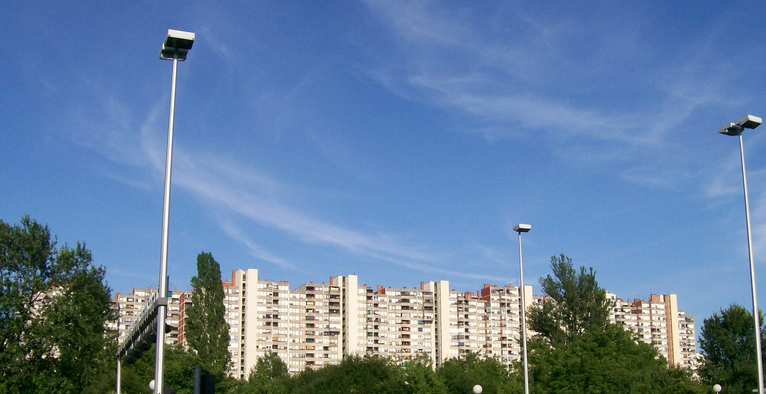 Pogled na zgradu "Mamutica", Travno, Zagreb.